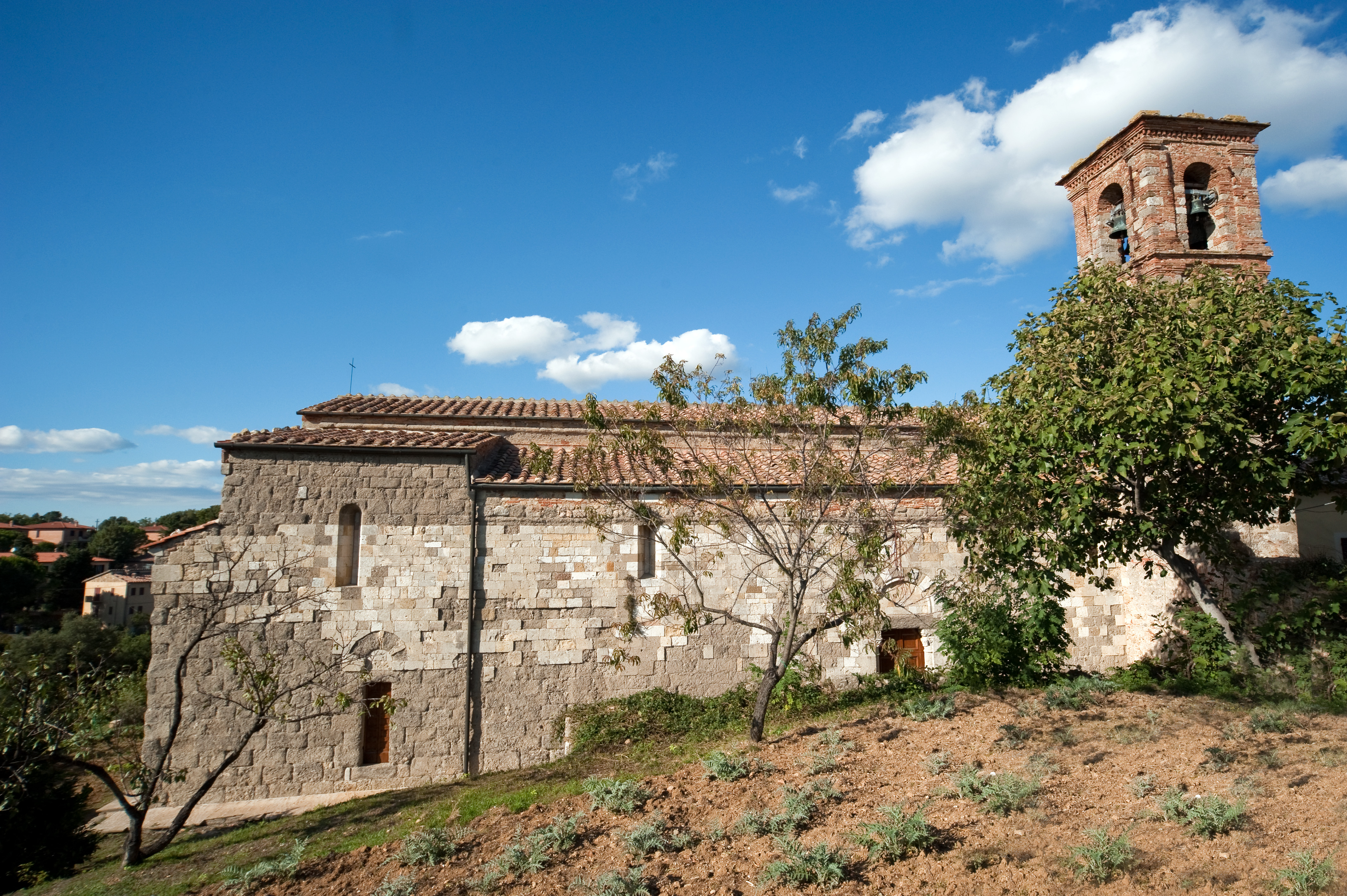 Fiancata sinistra della pieve di san Giovanni Battista a Mensano